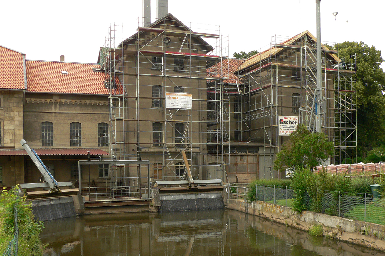 Leinewehr oder Mühle in Brüggen